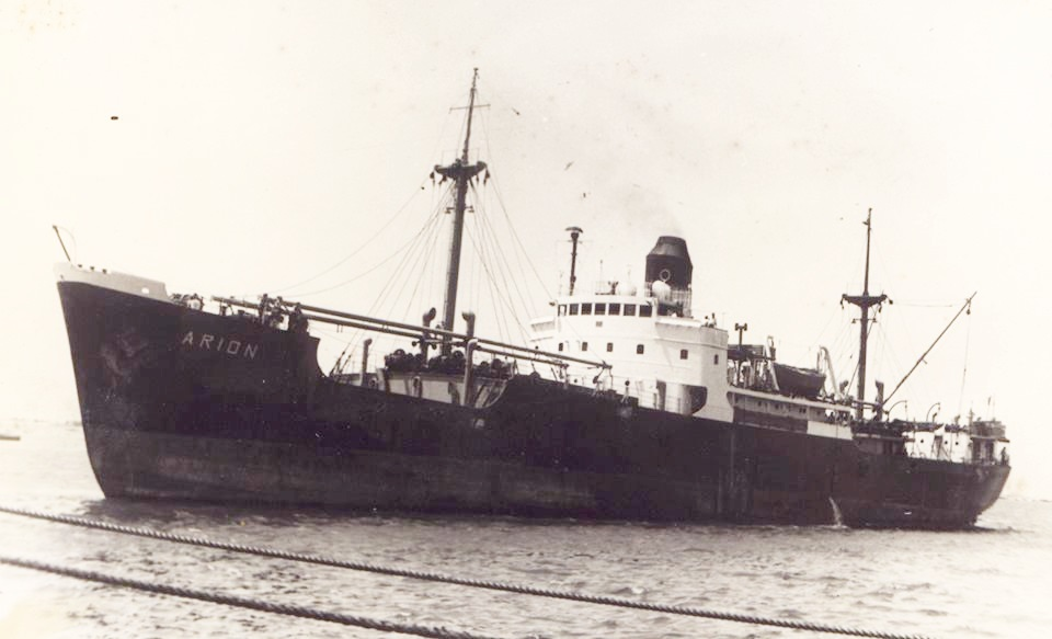 האונייה היוונית אריון בעת רכישתה לצורך שימוש כאוניית מבחן דולפין